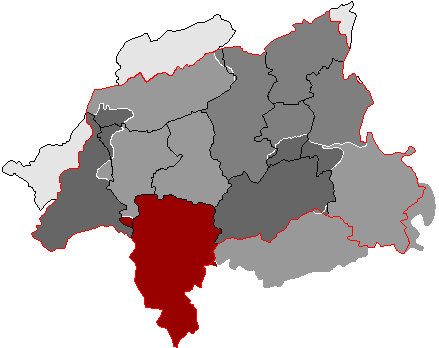 Die Stadt Ronsdorf und ihre Eingliederung nach Wuppertal 1929